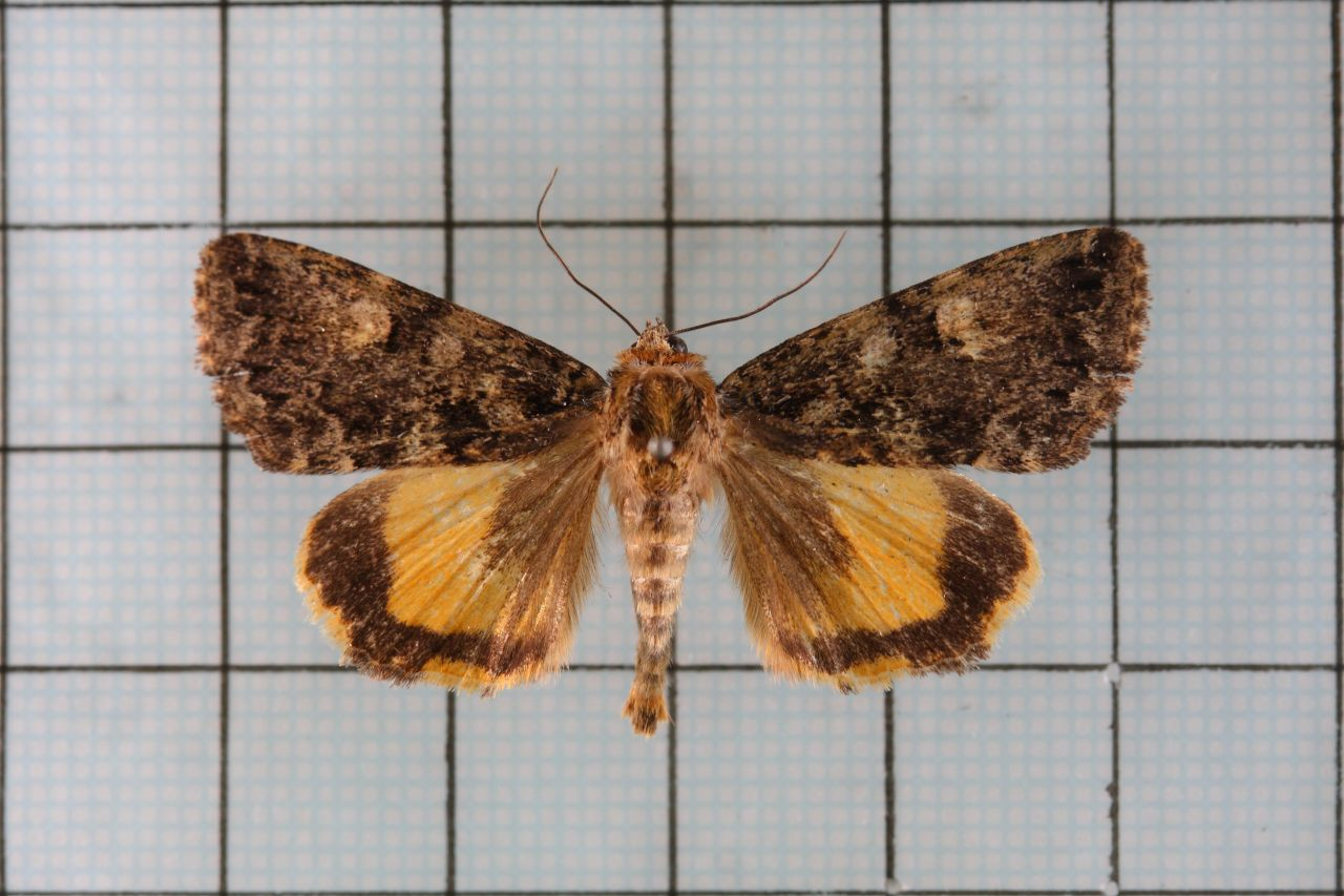 Olivenebula monticola Kishida & Yoshimoto 鞍1:P.83,Pl.24-15